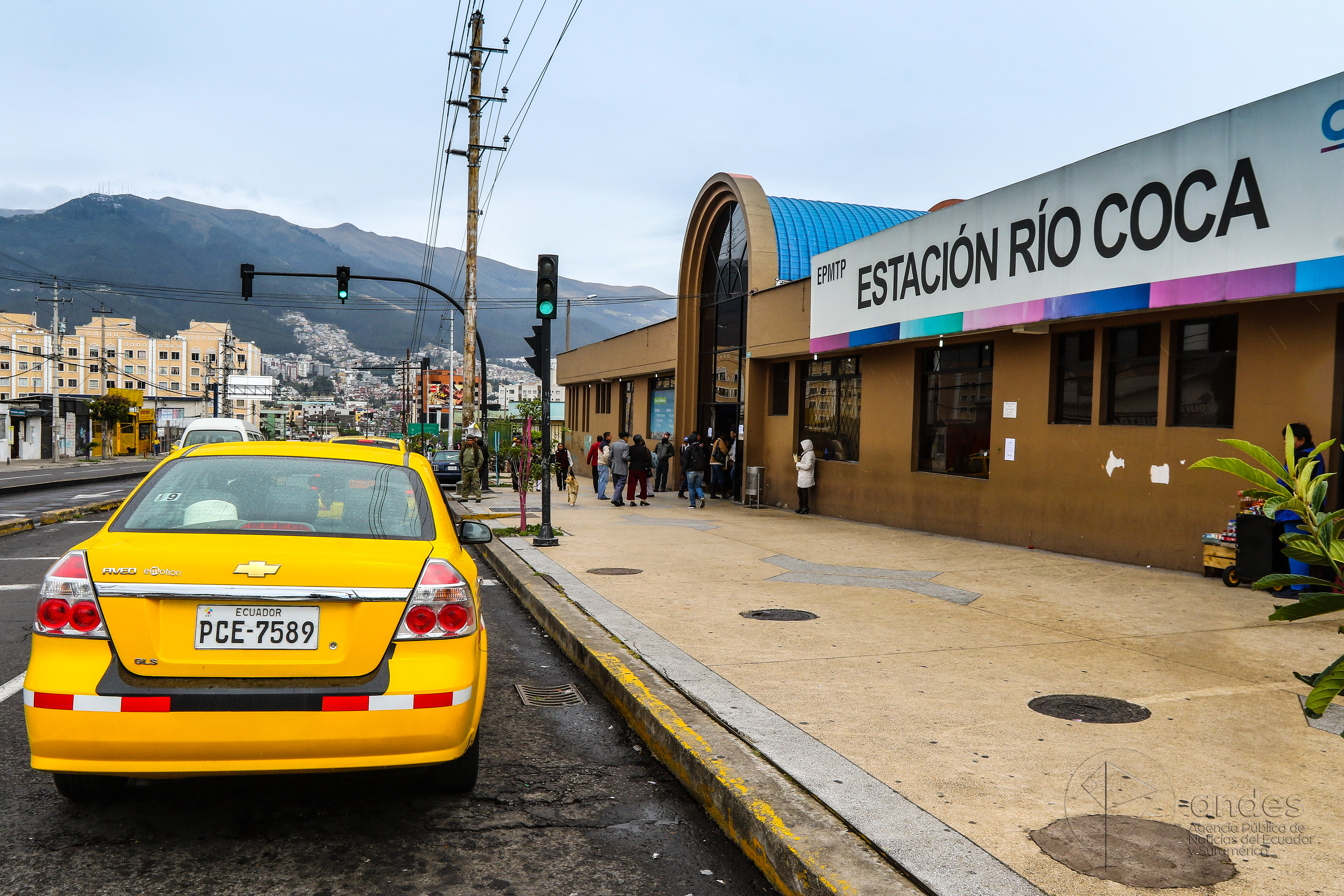 Quito 25 Ago (ANDES).- El paro del servicio público de transporte deja a los usuarios con dificultades en su movilidad. Fotografías: Carlos Rodríguez/Andes.